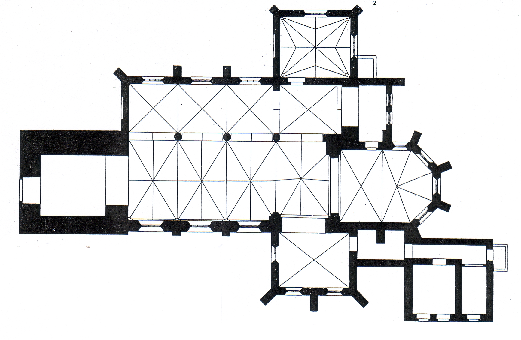 Stiftskirche Borghorst, Gebäude 1885 abgerissen